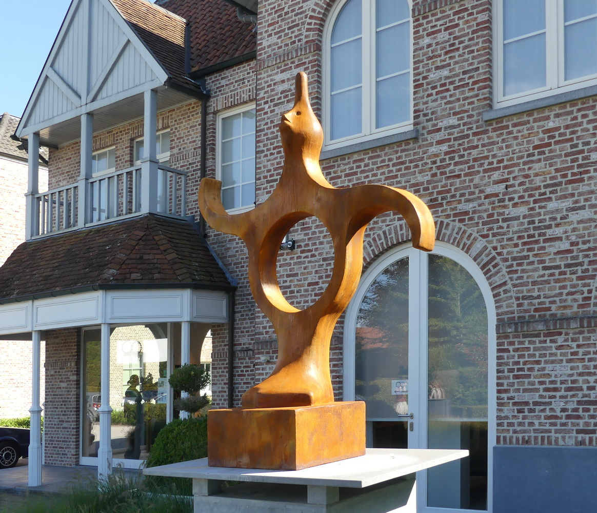 Sculpture intitulée « Flying wheel » inspirée la roue chamanique de médecine.